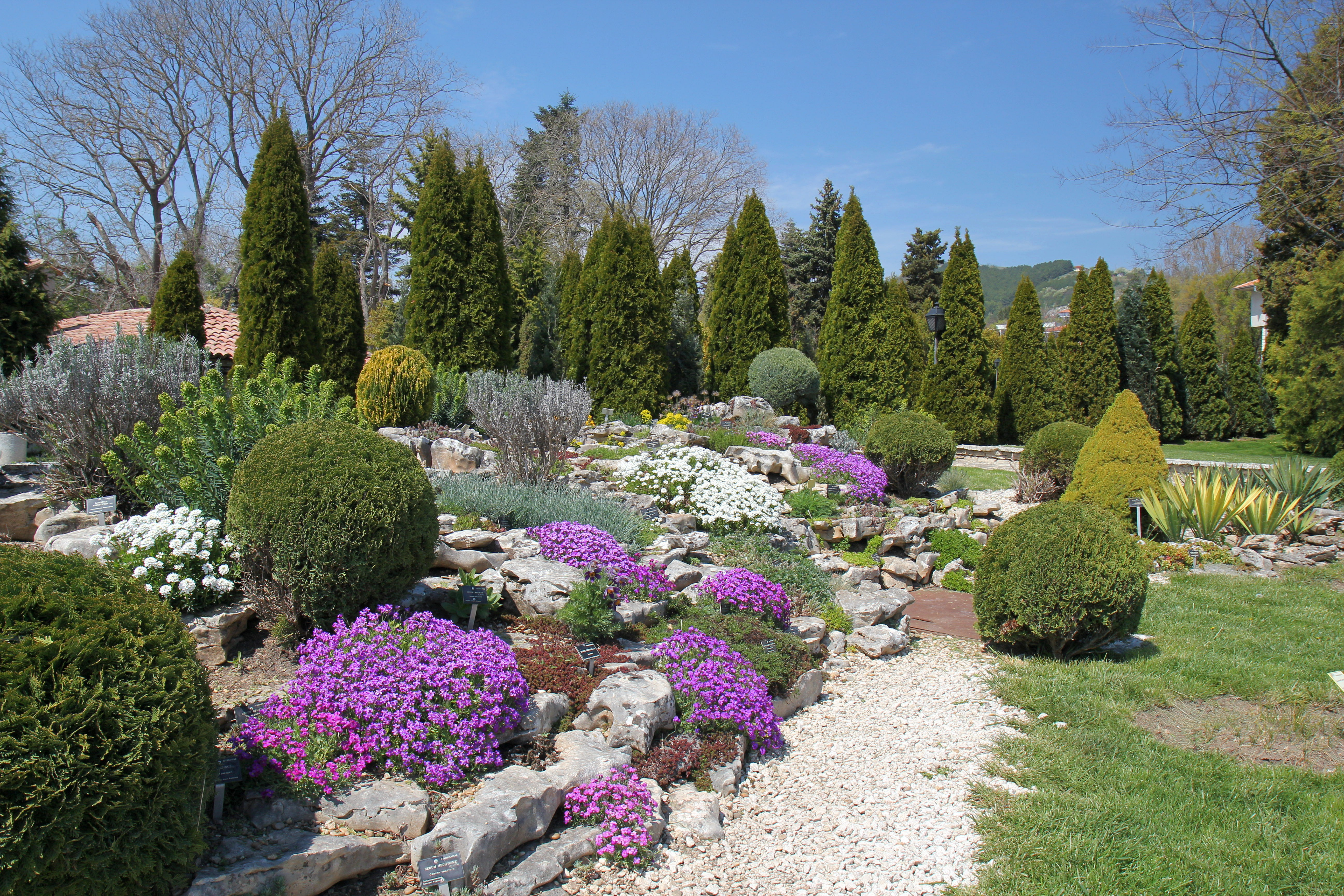 Архитектурно-парков комплекс „Двореца"